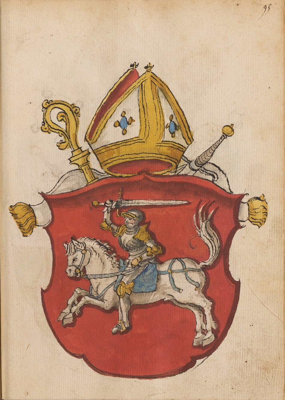 Беларуская (тарашкевіца): Герб «Пагоня» («Pahonia») біскупа віленскага Яна з княжатаў літоўскіх (Jan z knižataŭ litoŭskich)